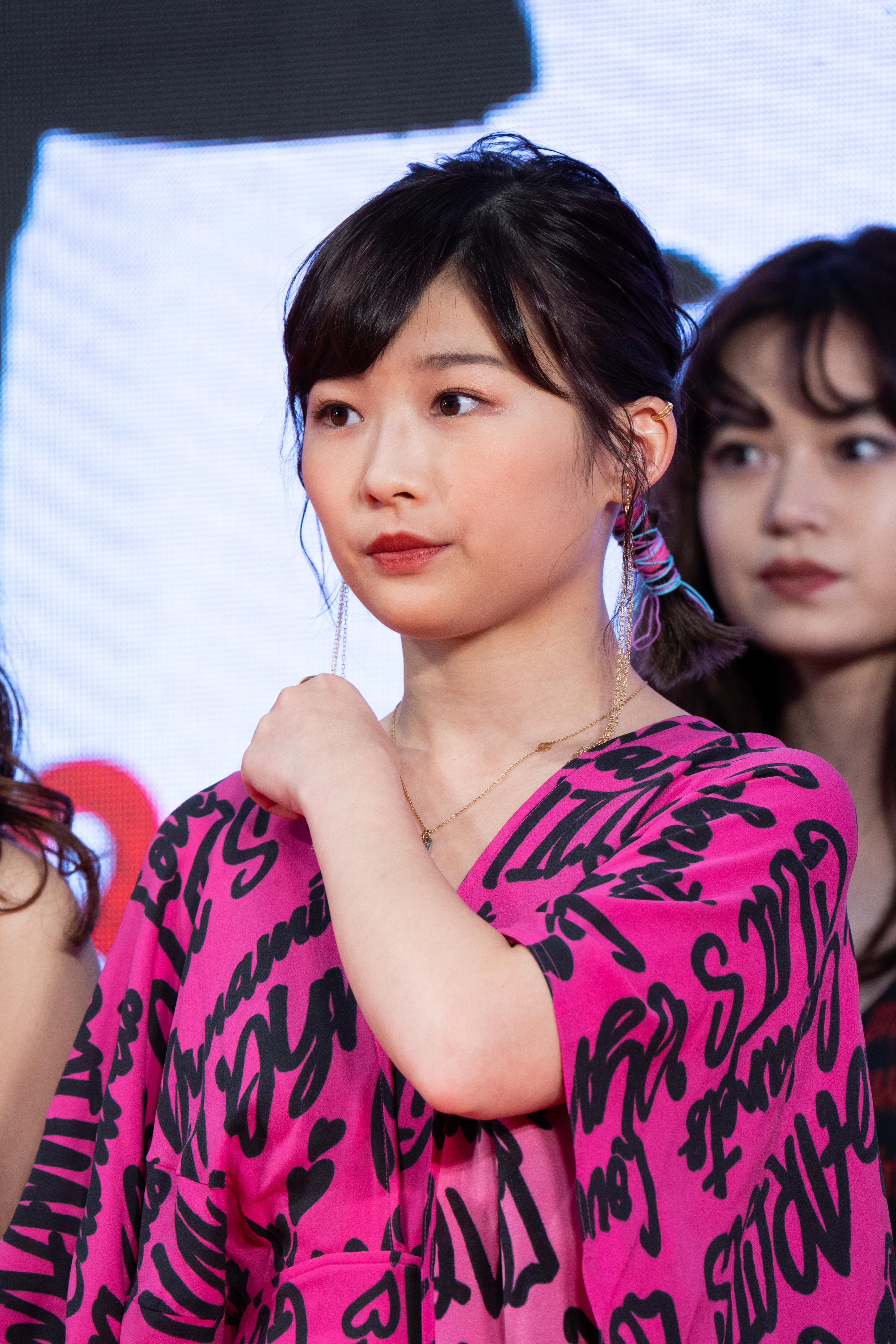 第32回 東京国際映画祭 オープニングセレモニー 伊藤沙莉 (タイトル、拒絶)